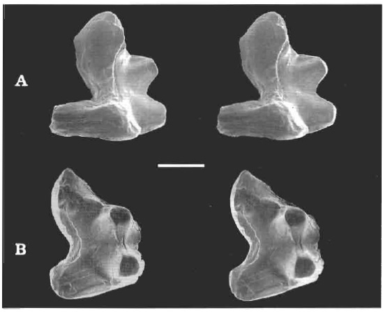 Deltatheridium nessovi sp. n., partial right M2, ZIN 82193, holotype. A. Labial view. B. Occlusal view. SEM stereo-micrographs. Scale bar is 1 mm. Anterior is up.